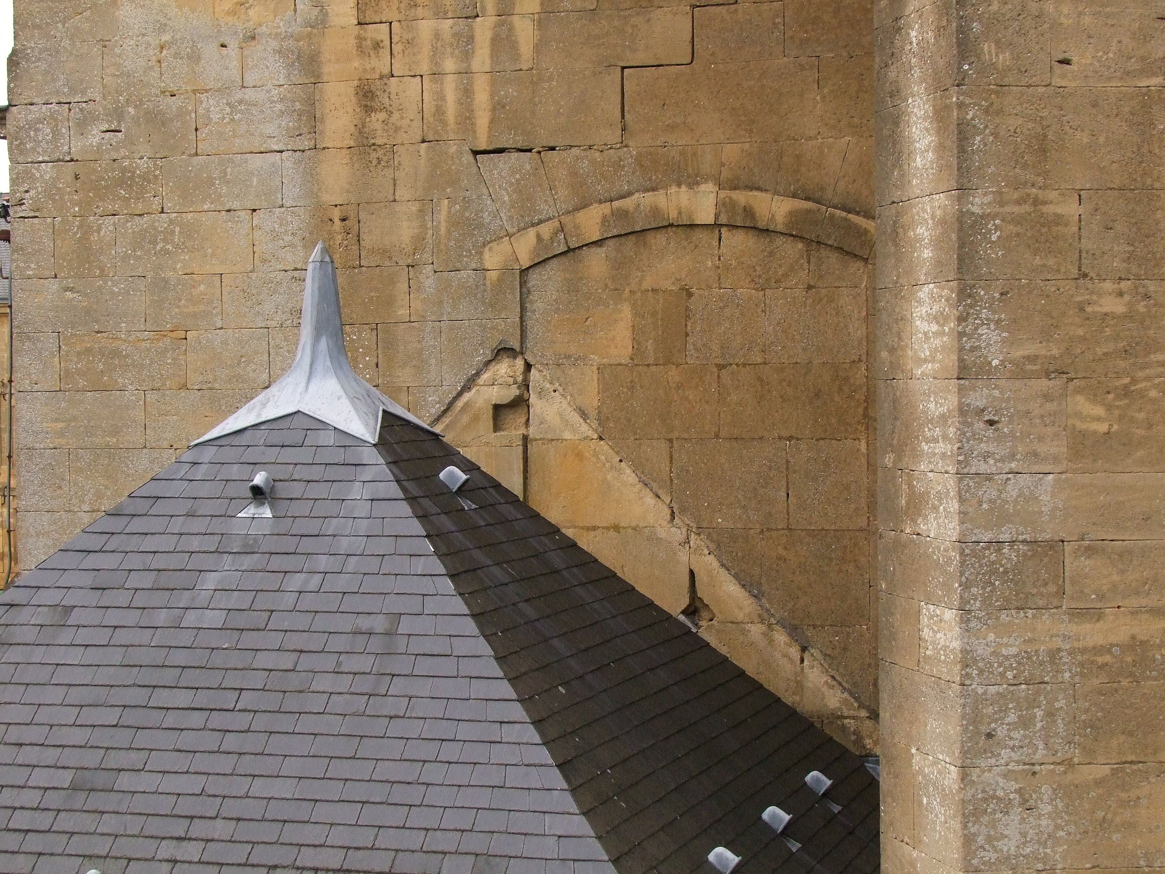 Eglise Saint-Martin de Montmédy, traces sur le chevet témoignant de l'emplacement de l'ancienne toiture de la sacristie